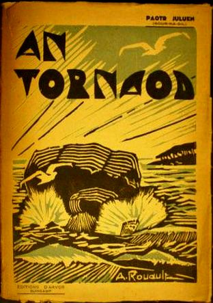 Couverture du livre An Tornaod de Paotr Juluen